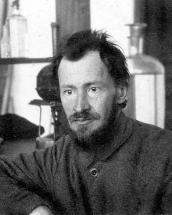 Драверт, Пётр Людовикович в Омской Сельскохозяйственной академии